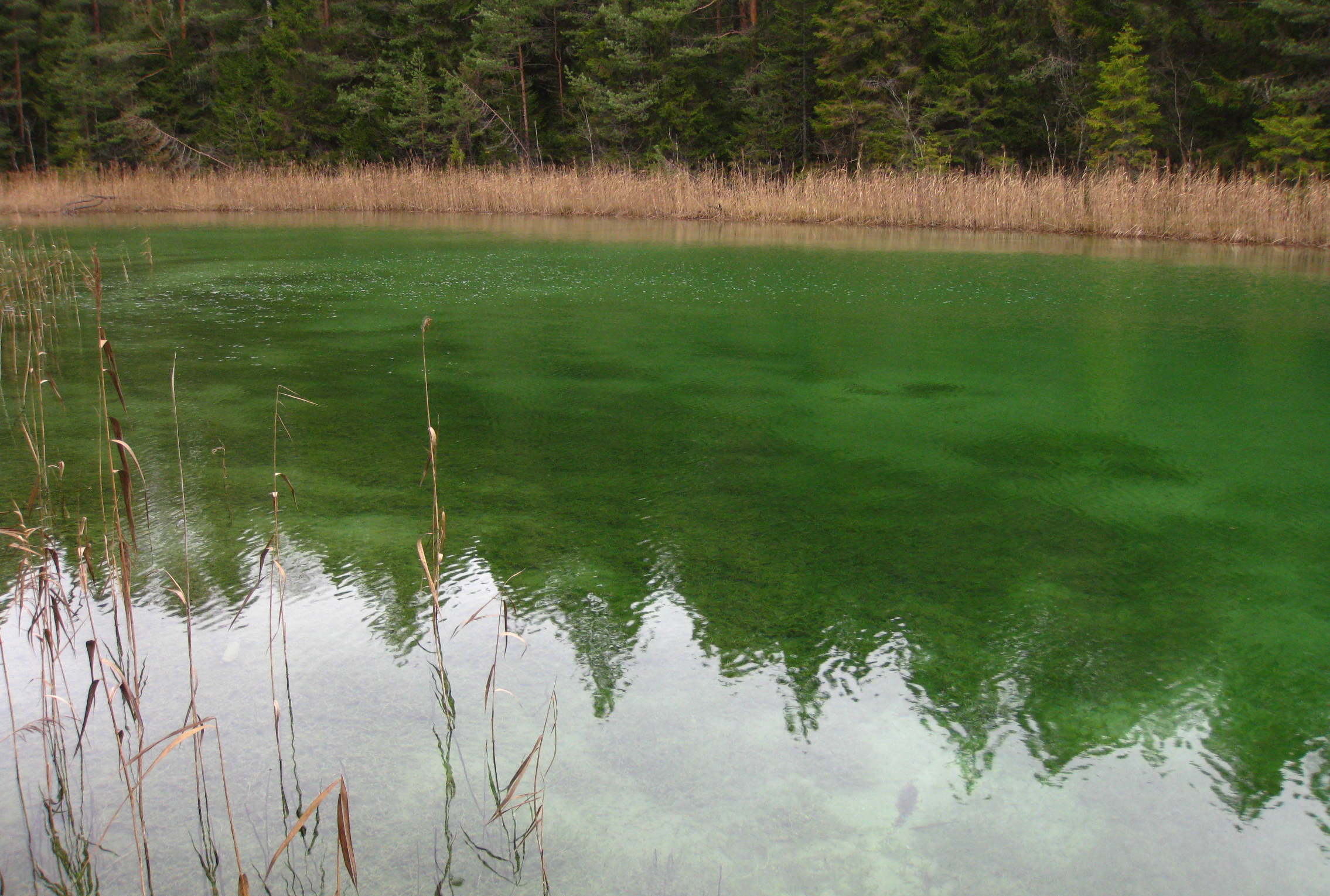 Äntu Vahejärv